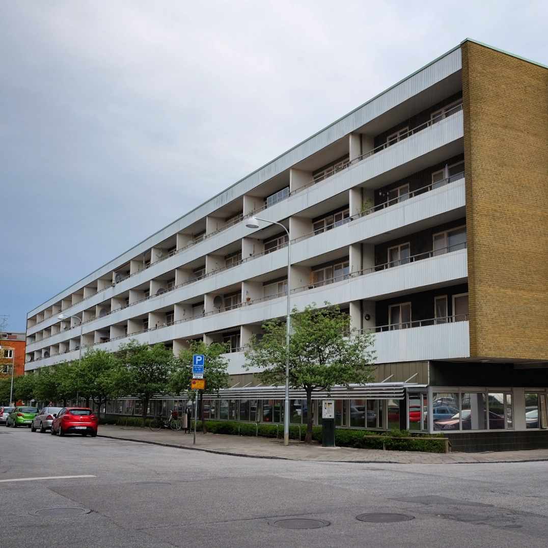 Lägenhetshus på Ahlmansgatan i Malmö.